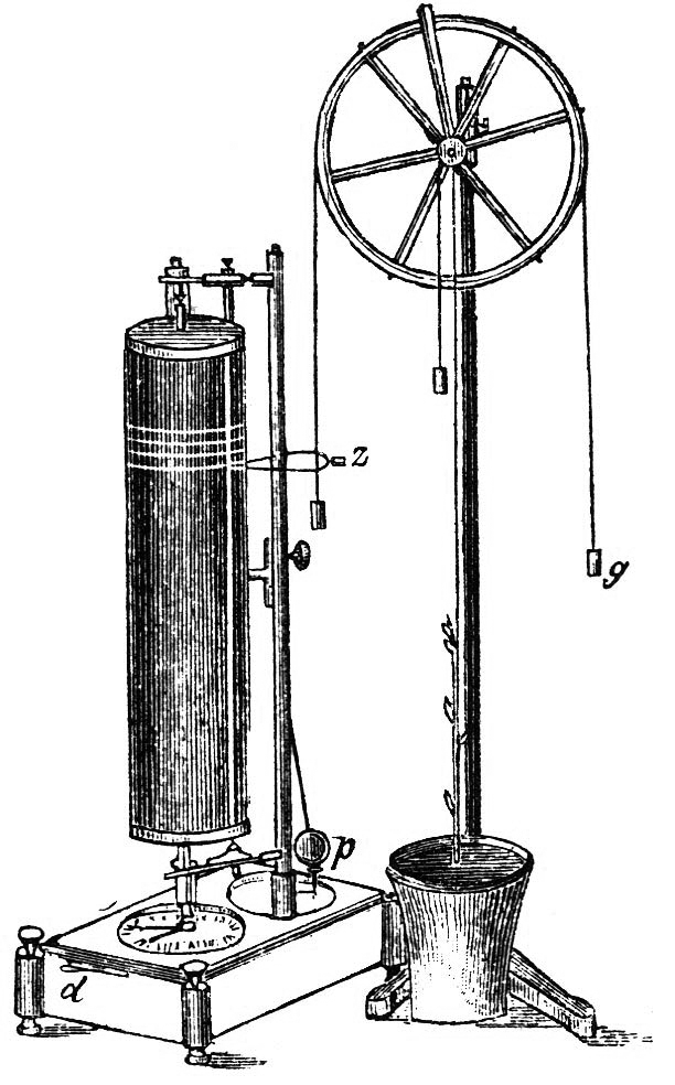 Авксанометр. Данное изображение используется в статье Авксанометр. Иллюстрация из энциклопедического словаря Брокгауза и Ефрона (1890—1907). Примечание. Описания изображений были загружены автоматически, возможны неточности. Рекомендуется проверять.